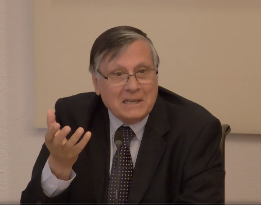 Paravicini Bagliani Agostino Podcasts de la Casa de Velázquez